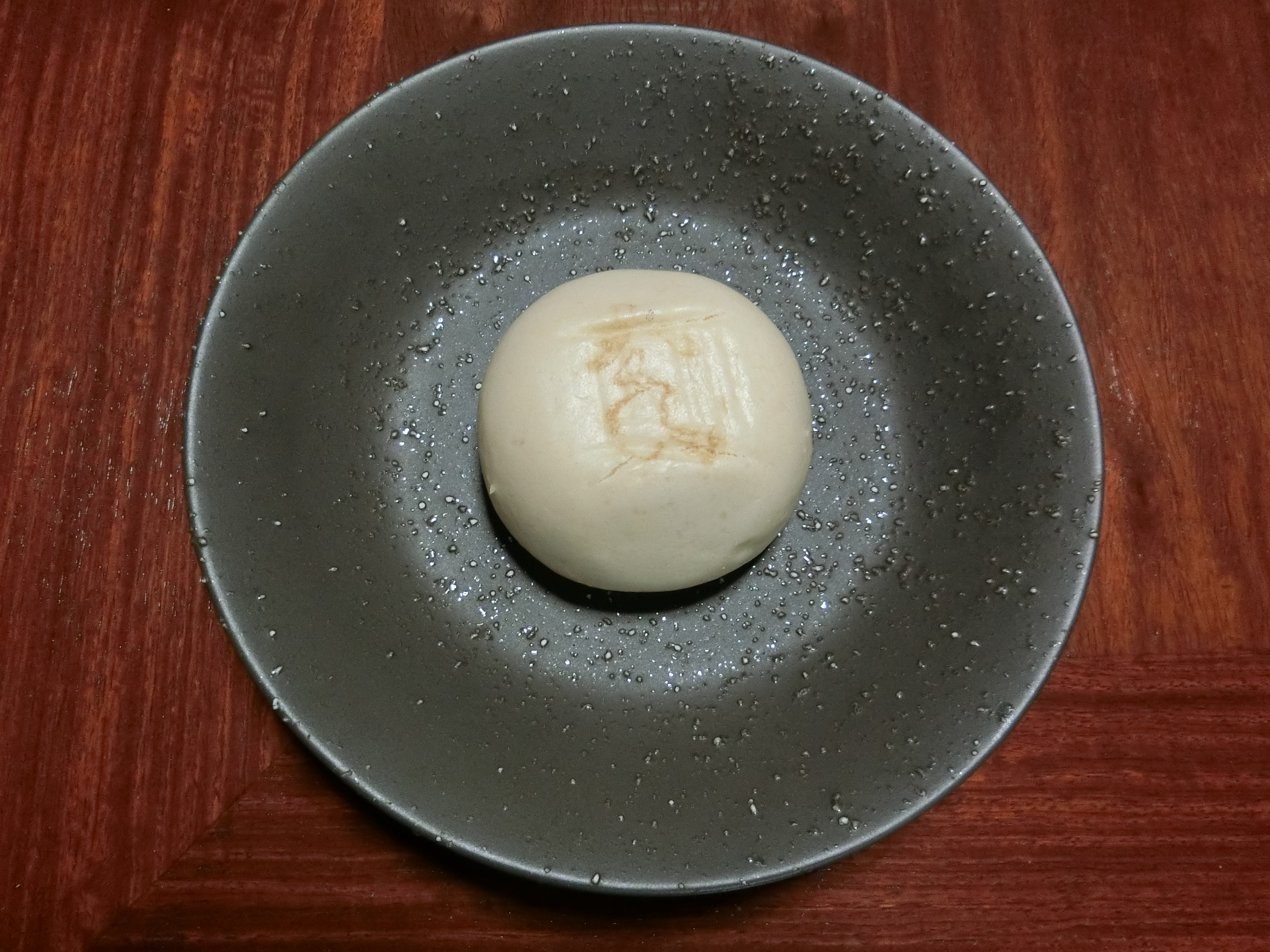 新潟県長岡市の銘菓大手饅頭